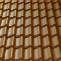 Pokrycie dachowe z esówek (Dachówka holenderka)